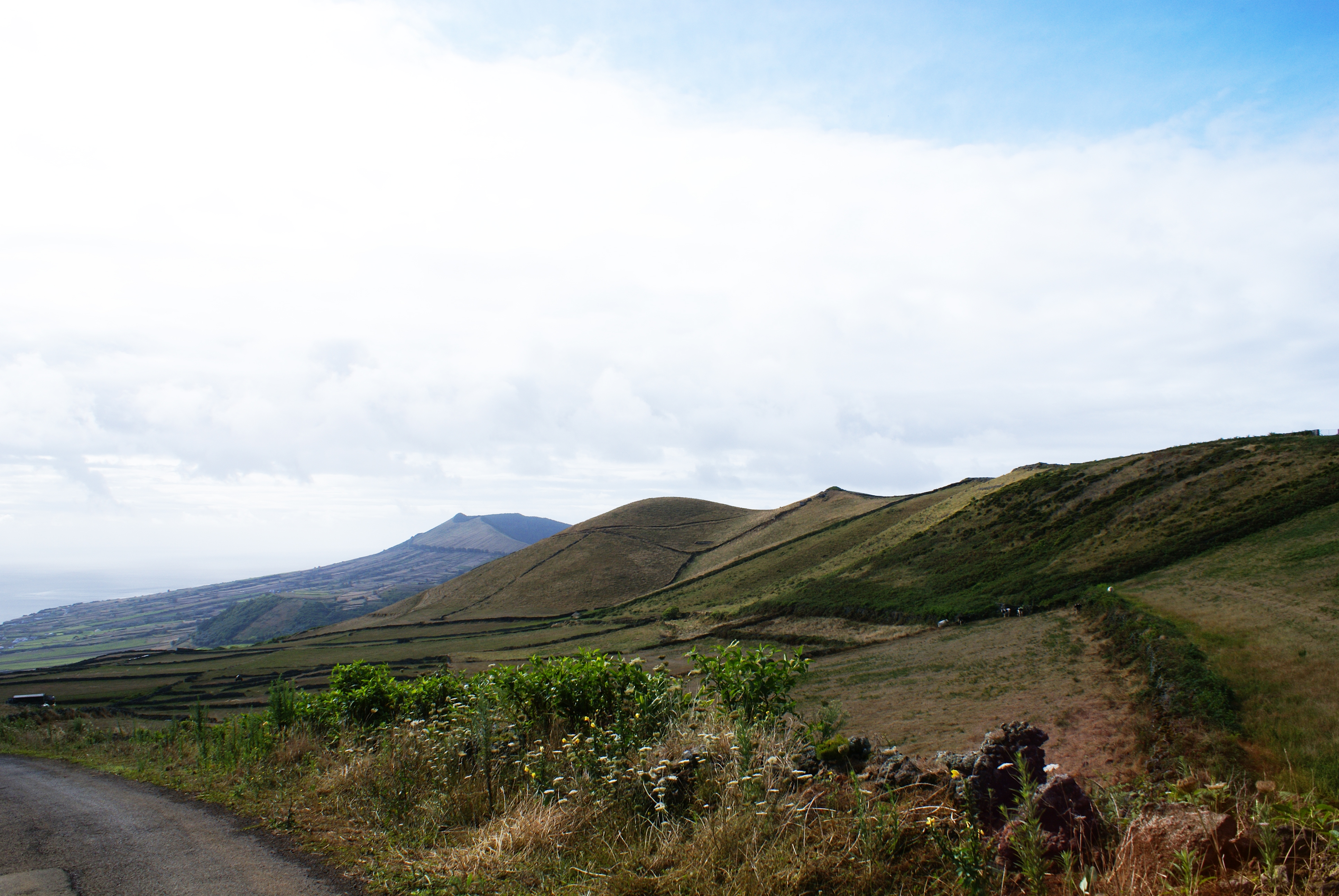 Serra das Fontes, vistas, Santa Cruz da Graciosa, ilha Graciosa, Açores, Portugal